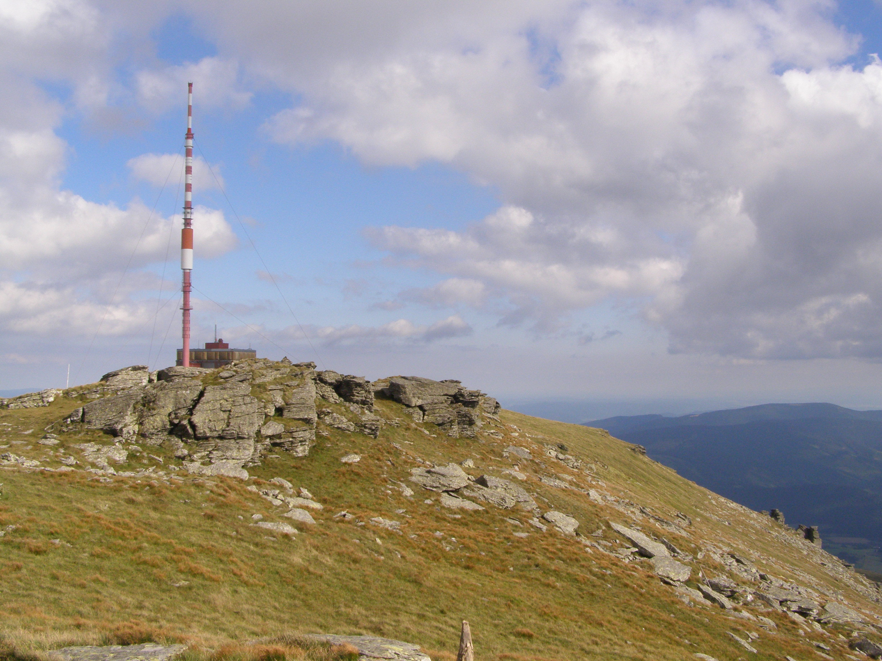 Nízké Tatry, Kráľovohoľské Tatry, vrchol Kráľova hoľa (1946 m)